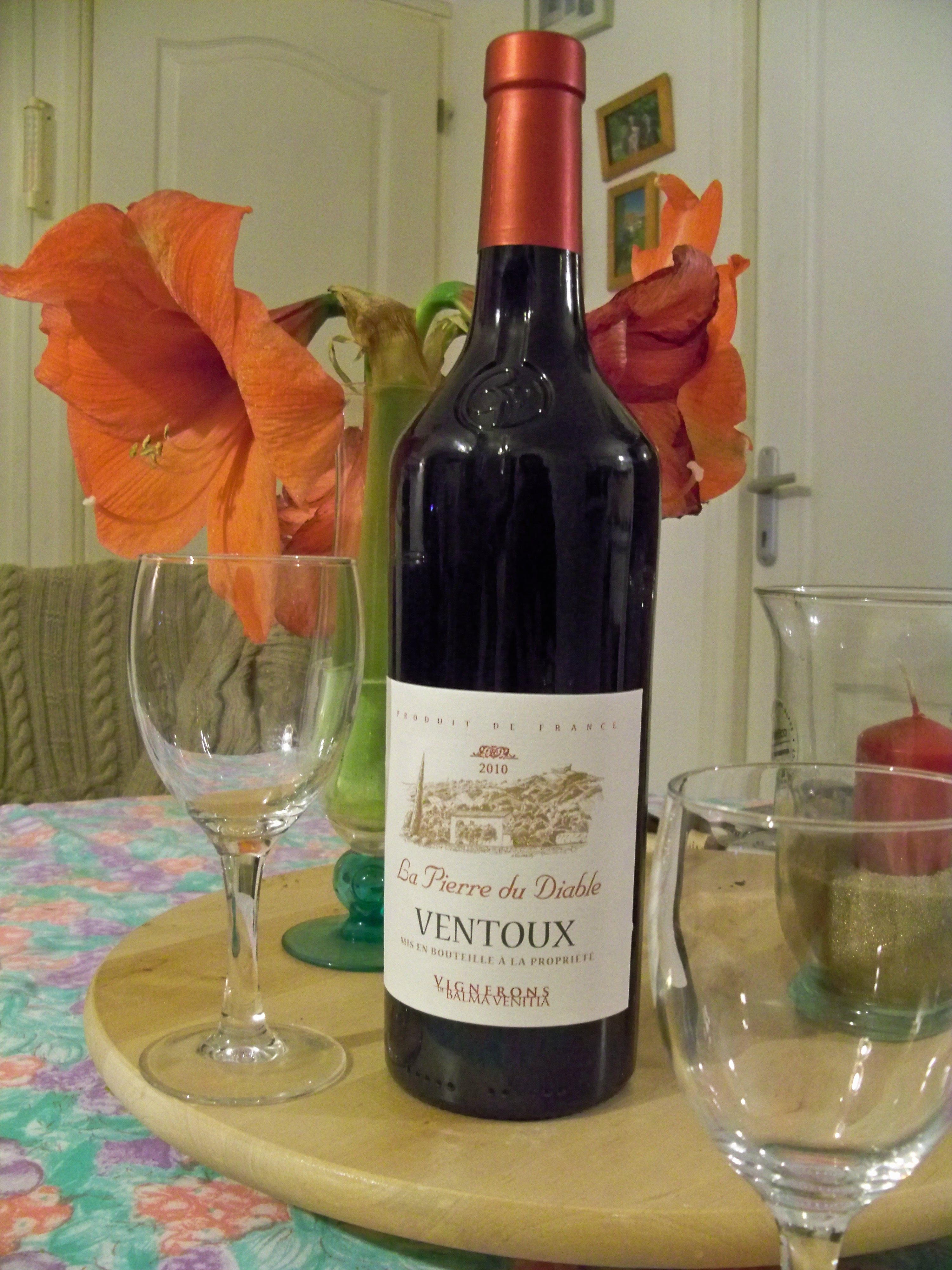 La Pierre du Diable (Beaumes-de-Venise - Vaucluse)